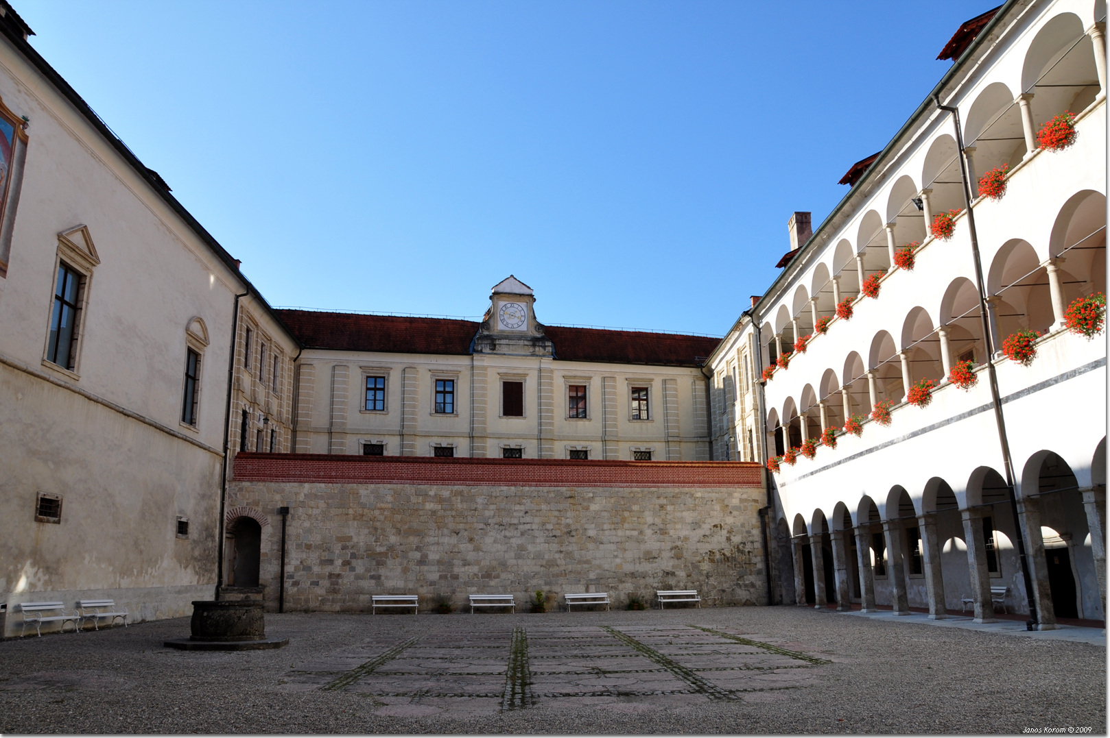 Brezice (16)